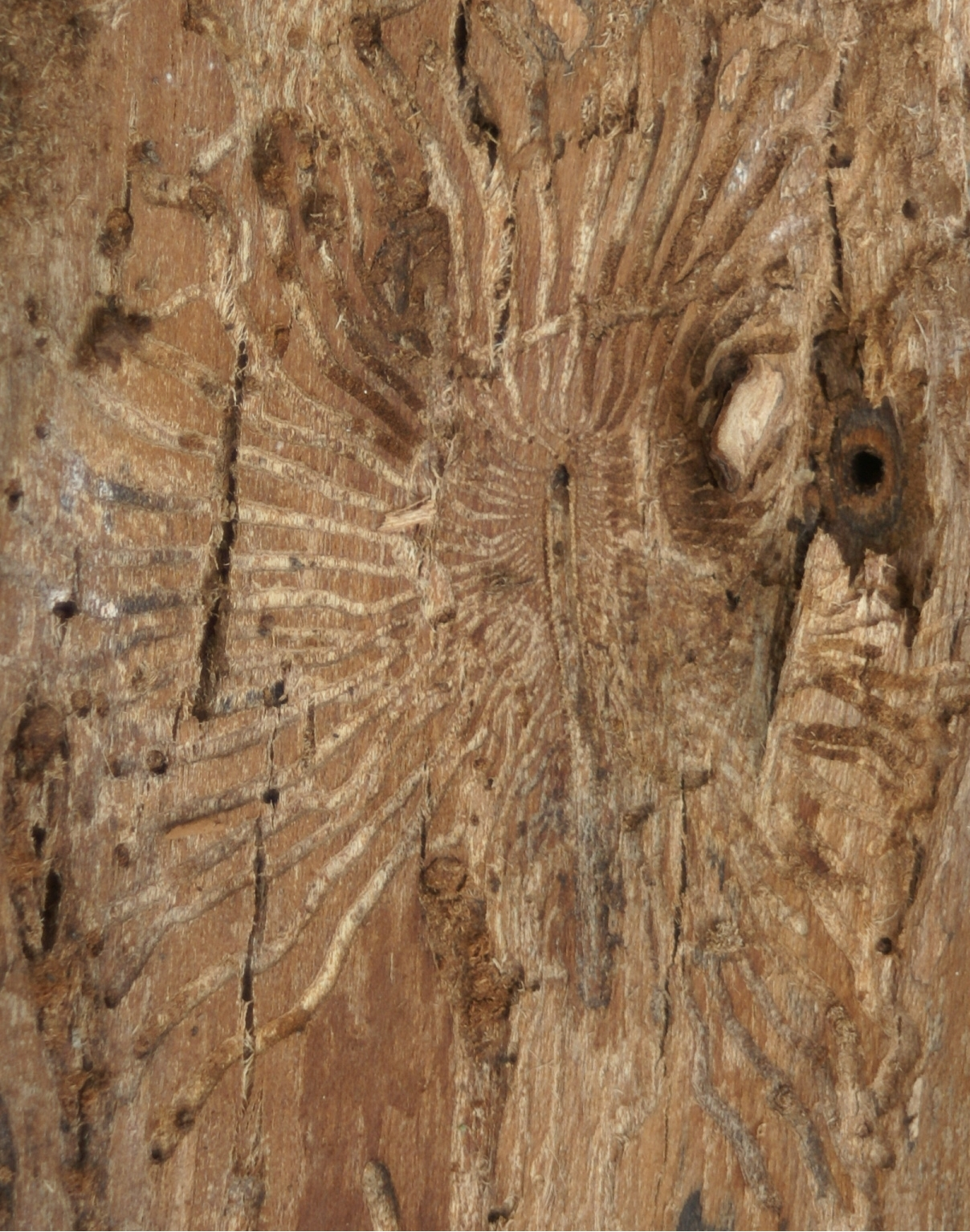 Fraßbild von Scolytus multistriatus mit Muttergang und Larvengängen.